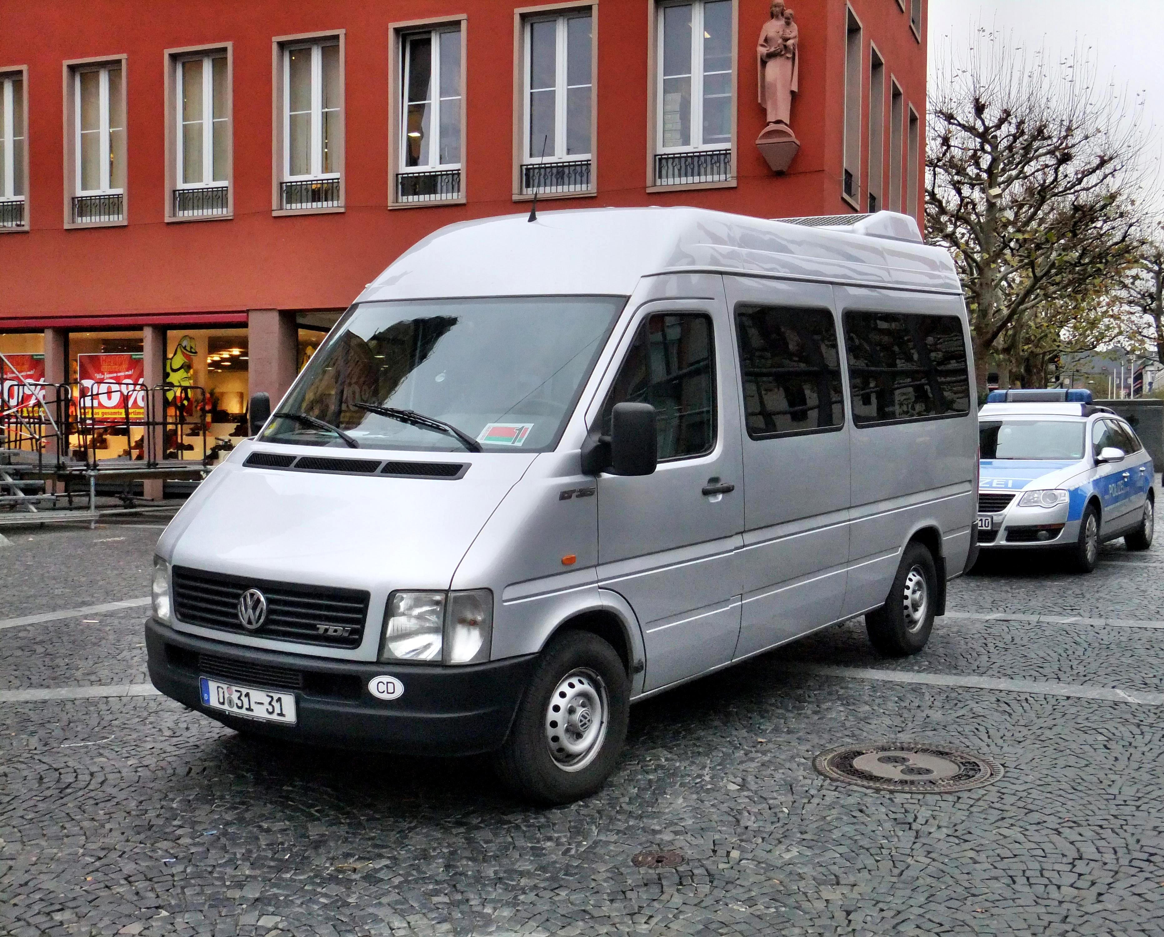 Volkswagen LT 35 TDI als Fahrzeug des Diplomatischen Corps der Republik Weißrussland auf dem Domplatz des Mainzer Doms in der Nähe der Heunensäule